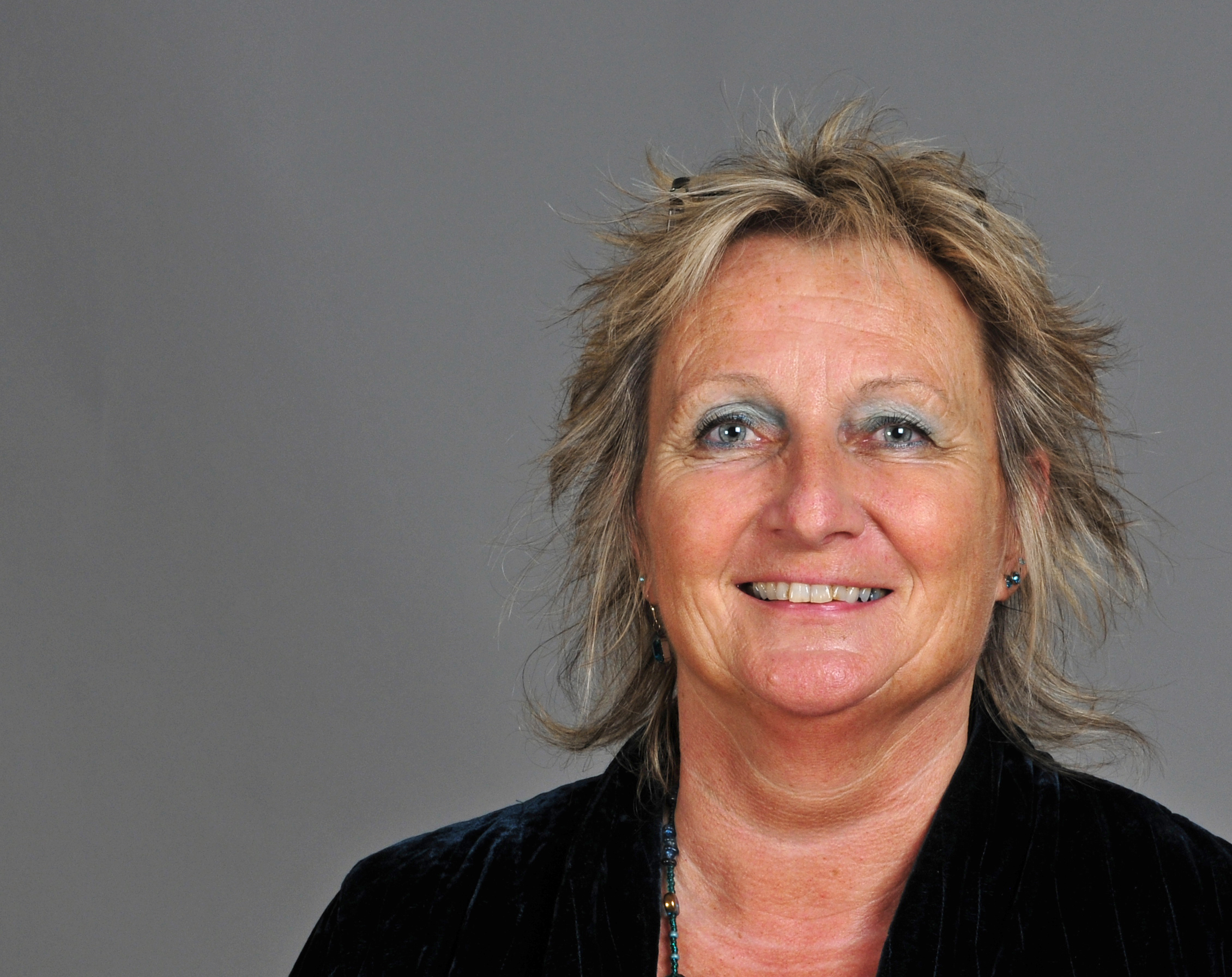 Irene Alt, Ministerin für Integration, Familie, Kinder, Jugend und Frauen Rheinland-Pfalz